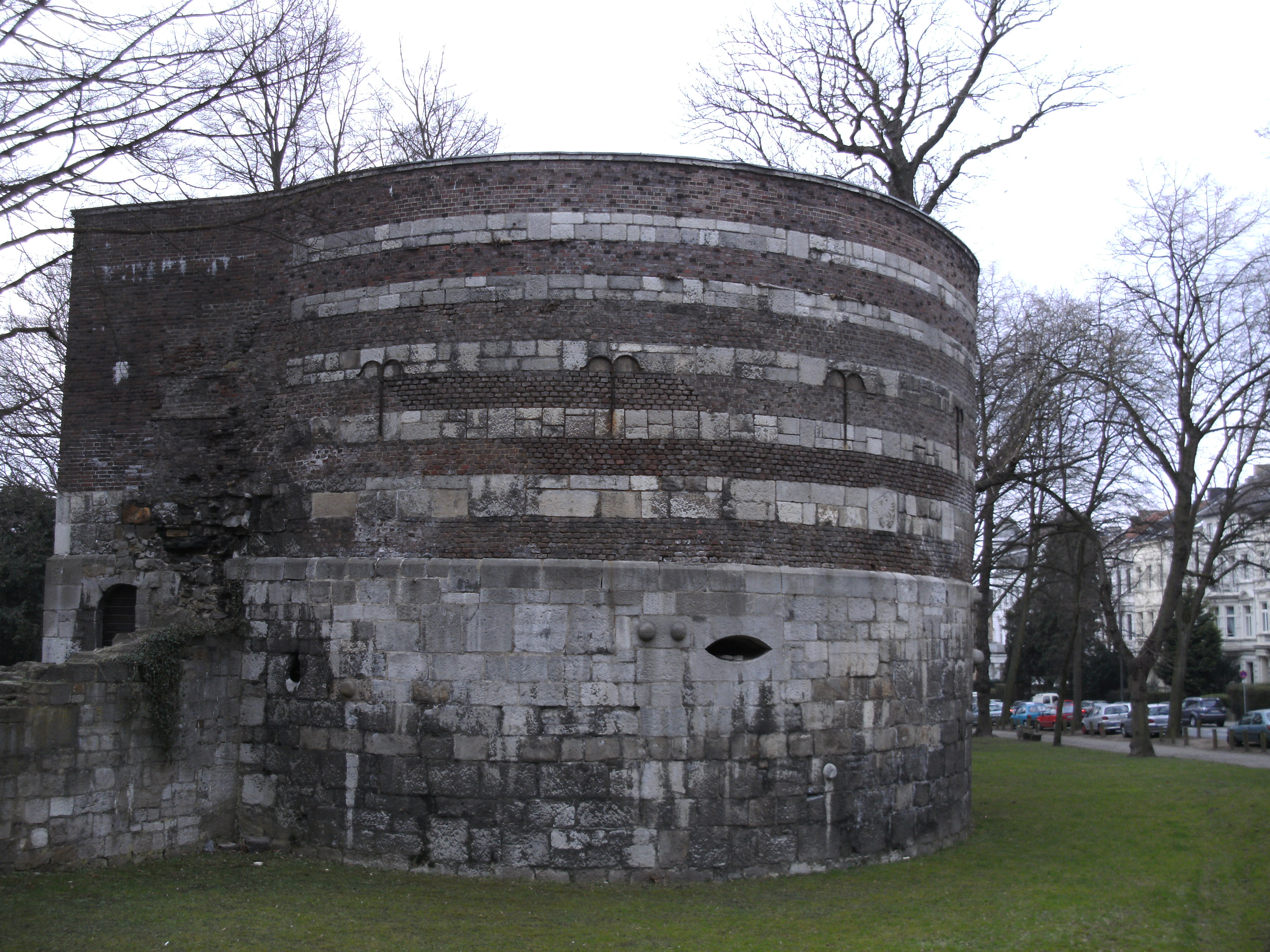 Marienturm Aachen